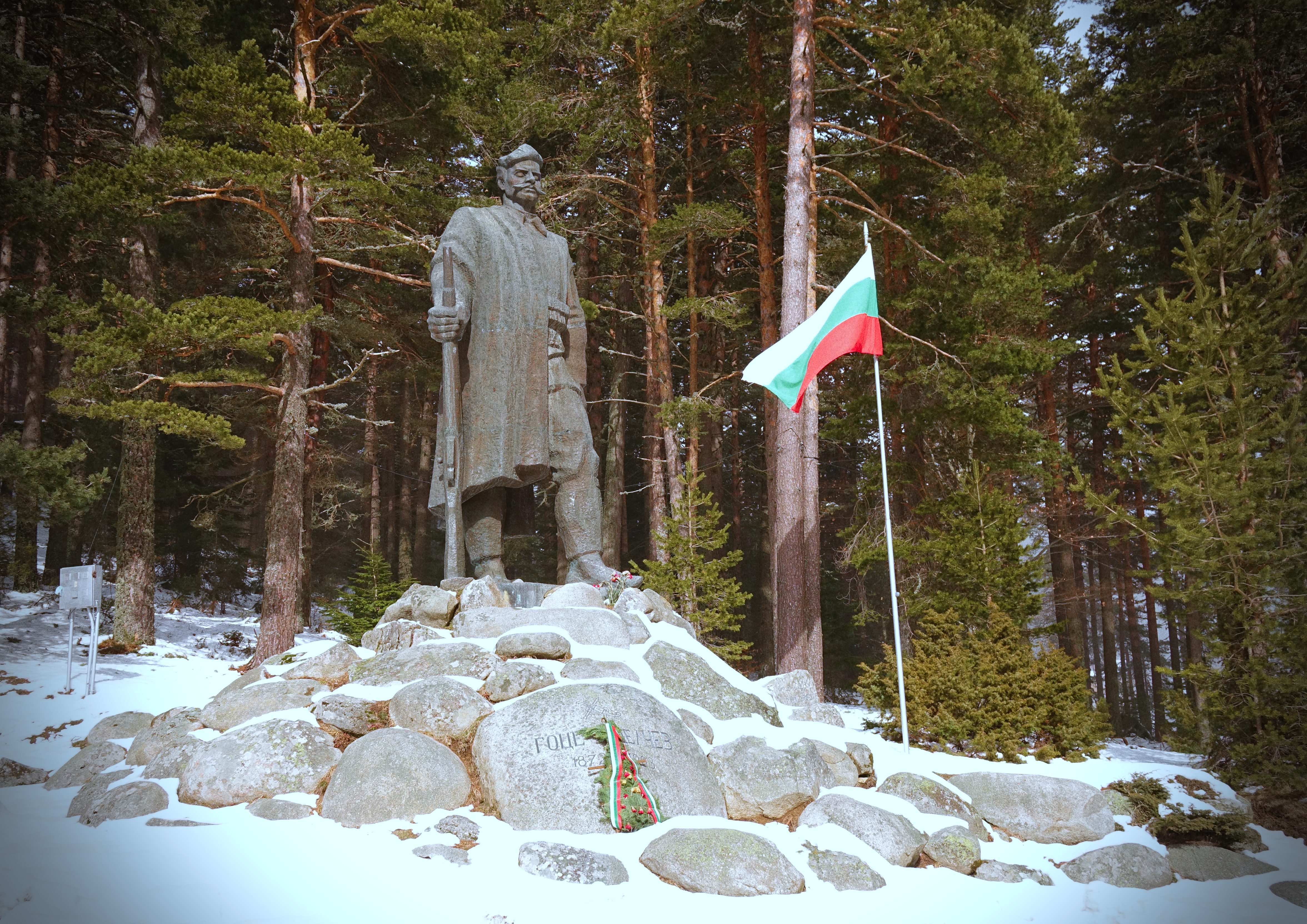 Паметник на Гоце Делчев в местността Попови ливади в Южен Пирин.